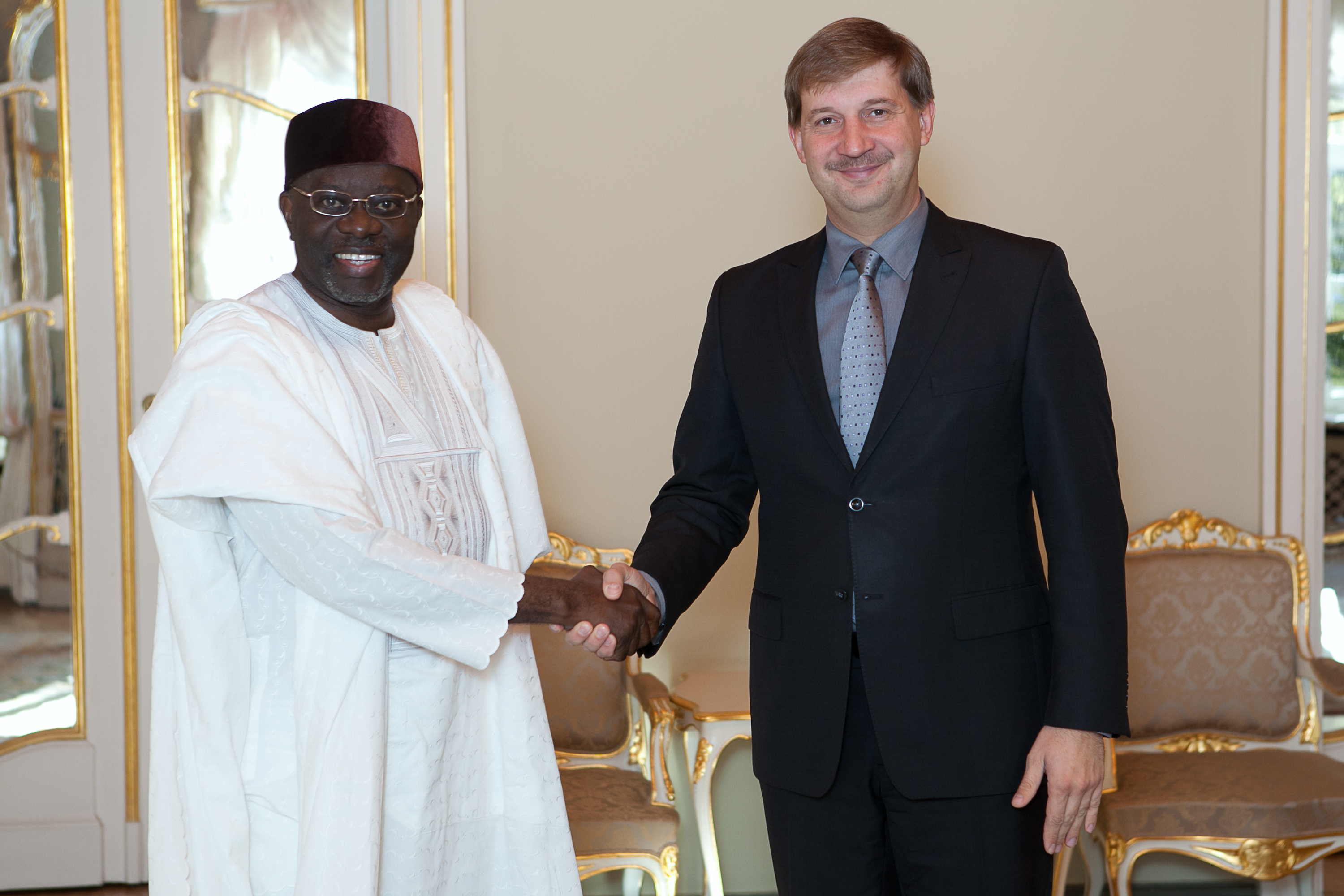 2012.gada 16.oktobris. Nigērijas Federatīvās Republikas ārkārtējā un pilnvarotā vēstnieka Latvijas Republikā Franka Ngozi Isoha (Frank Ngozi Isoh) iepazīšanās vizīte pie Saeimas priekšsēdētājas biedra Andreja Klementjeva. Foto: Ernests Dinka, Saeimas Kanceleja